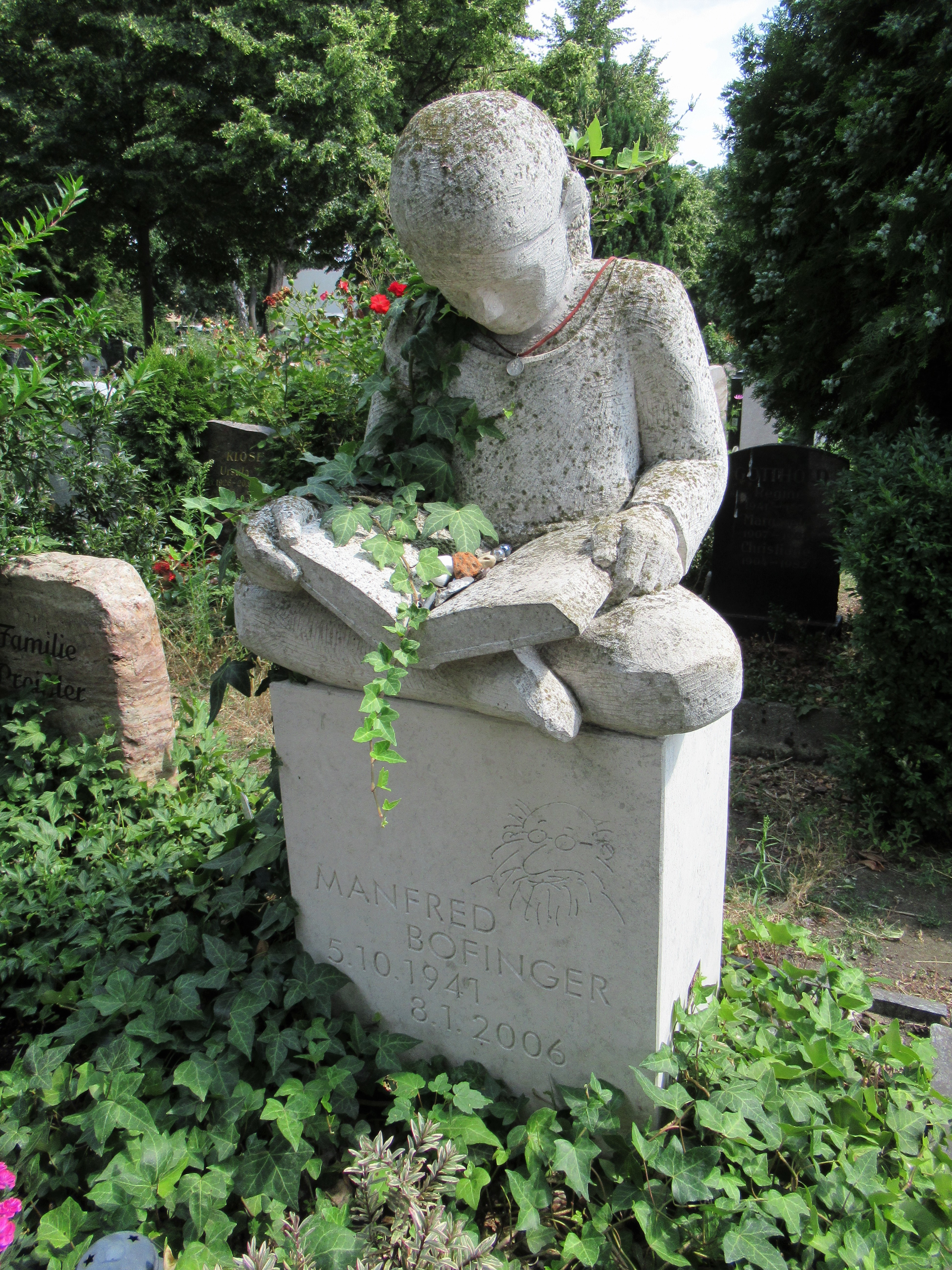 Grabstein für Manfred Bofinger von Matthias Heinz (DenkStein) auf dem Friedhof Stralau, Berlin-Stralau.